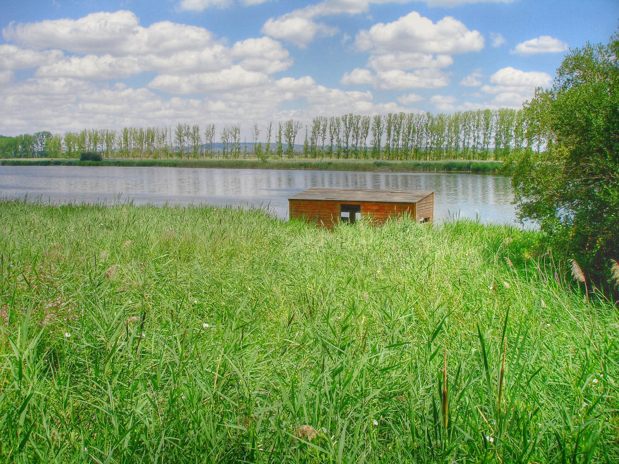 Reserva Natural de las Riberas de Castronuño-Vega del Duero (Valladolid, Castilla León, Spain)